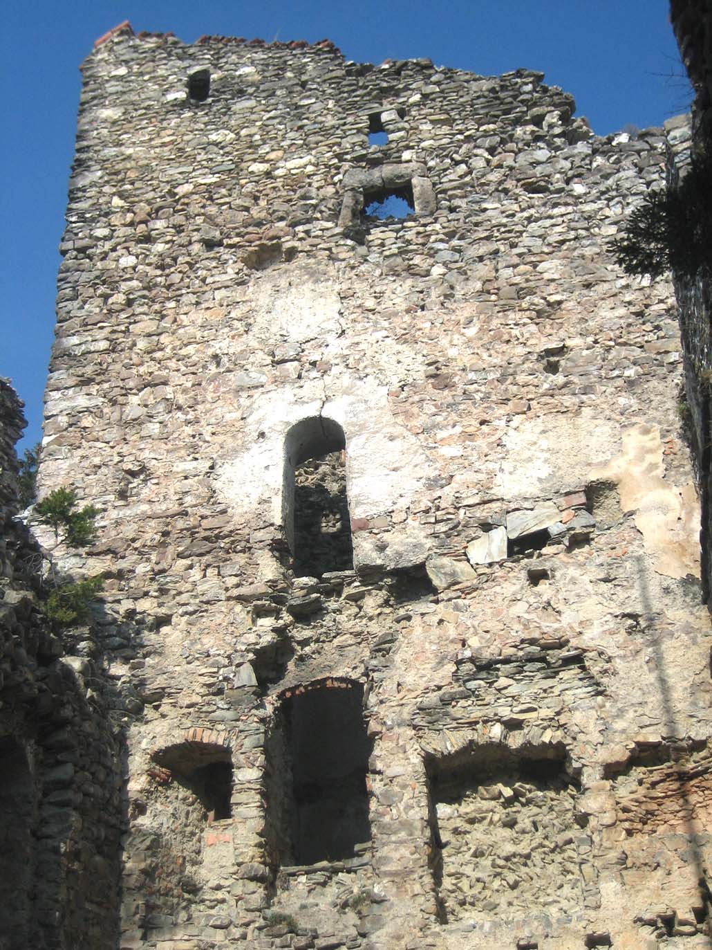 Aspermont Fassade Hauptturm